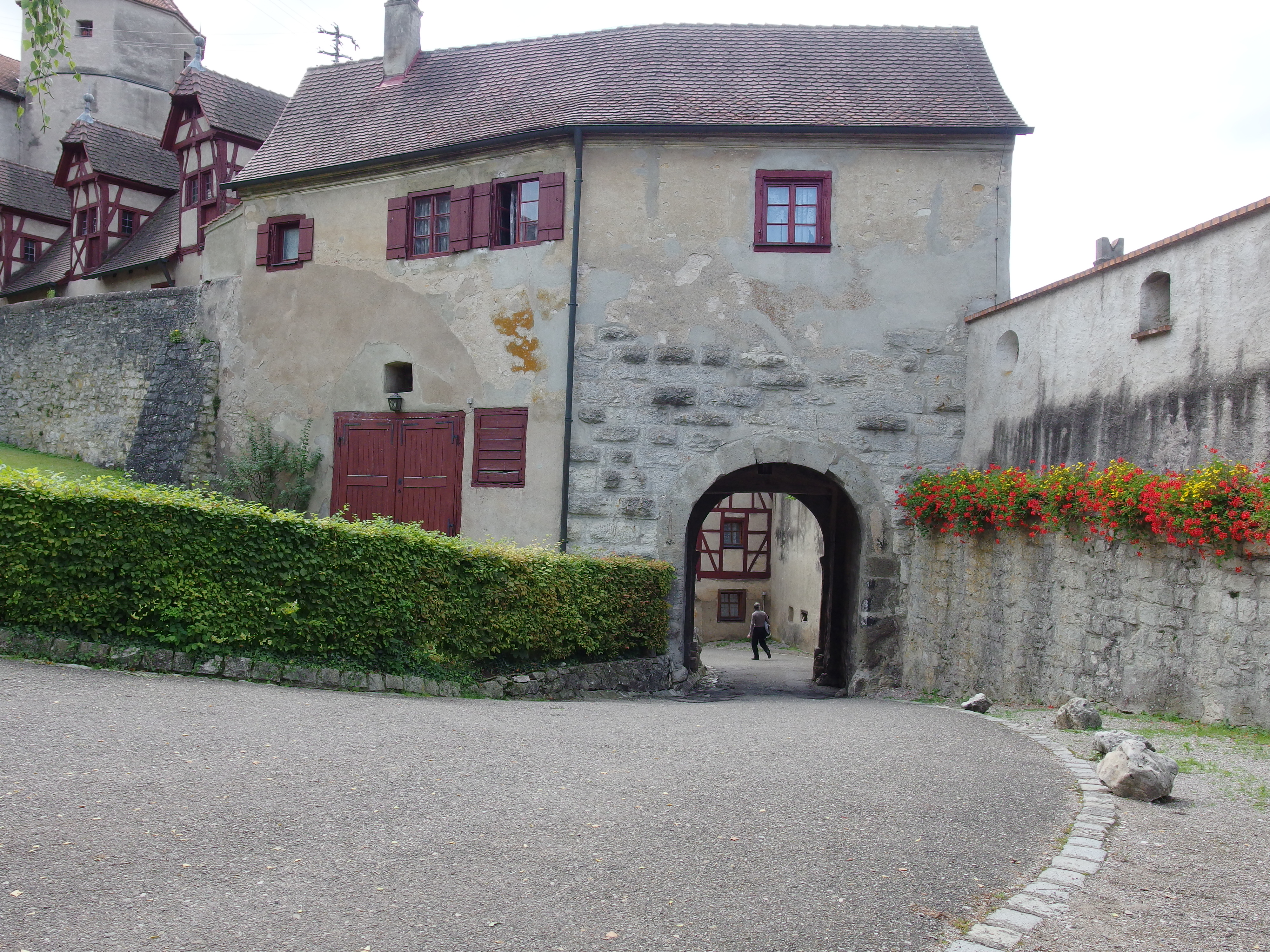 Harburg, Schloß Harburg, Inneres TorThis is a photograph of an architectural monument.